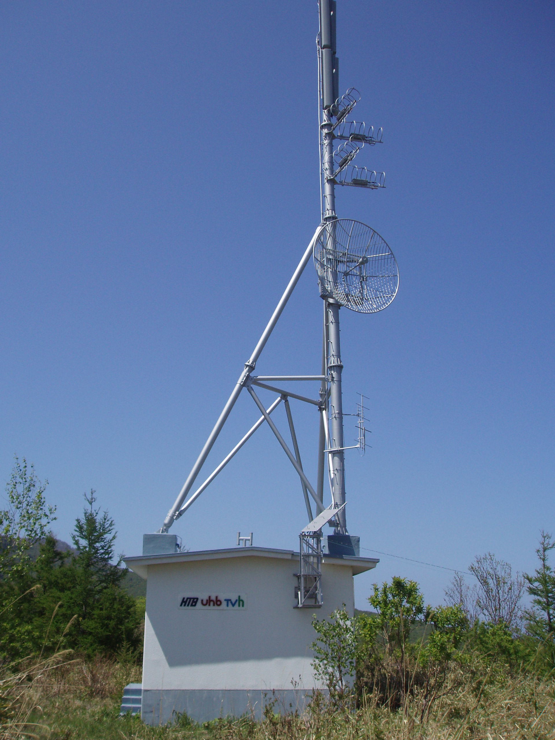 岩内中継局 HTB・UHB・TVh送信設備